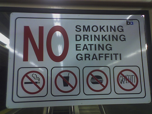 lo doy